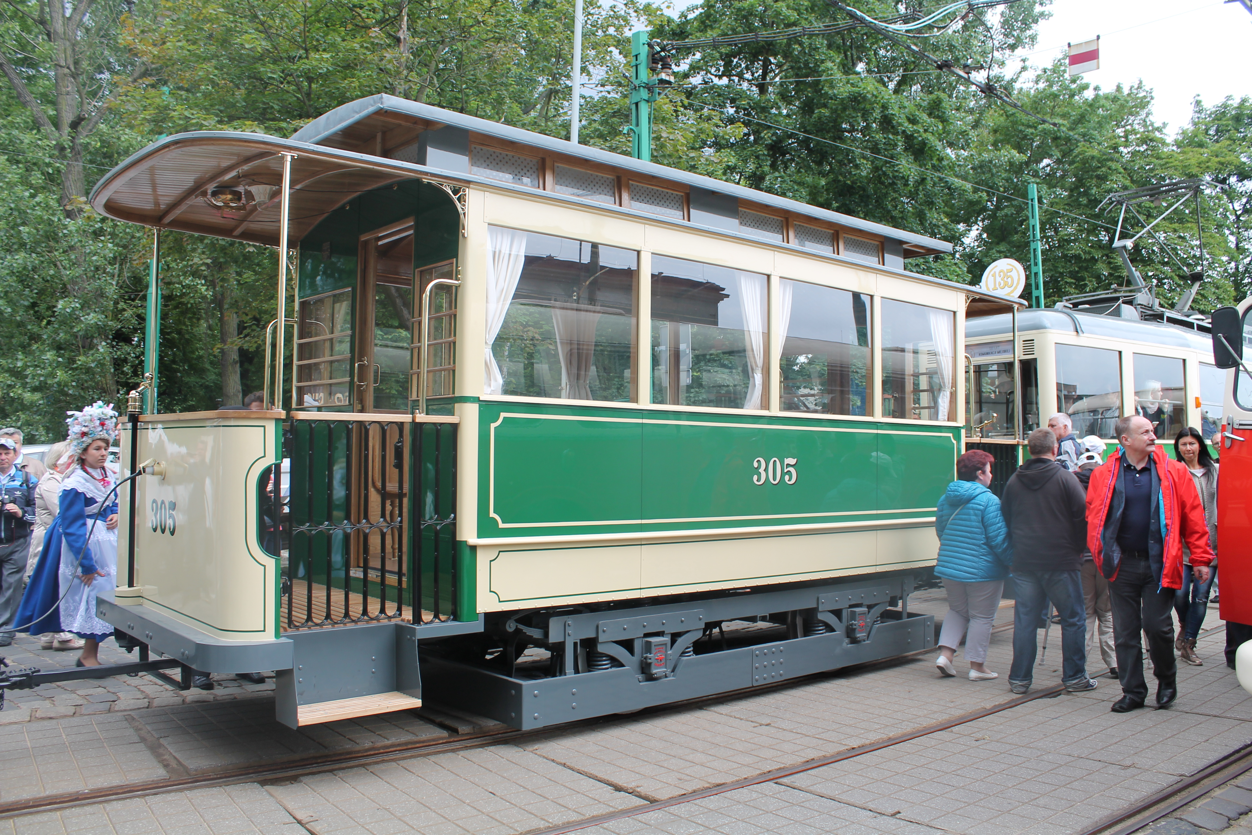 Wagon doczepny Carl Weyer nr 305 na paradzie z okazji 135 lat MPK Poznań